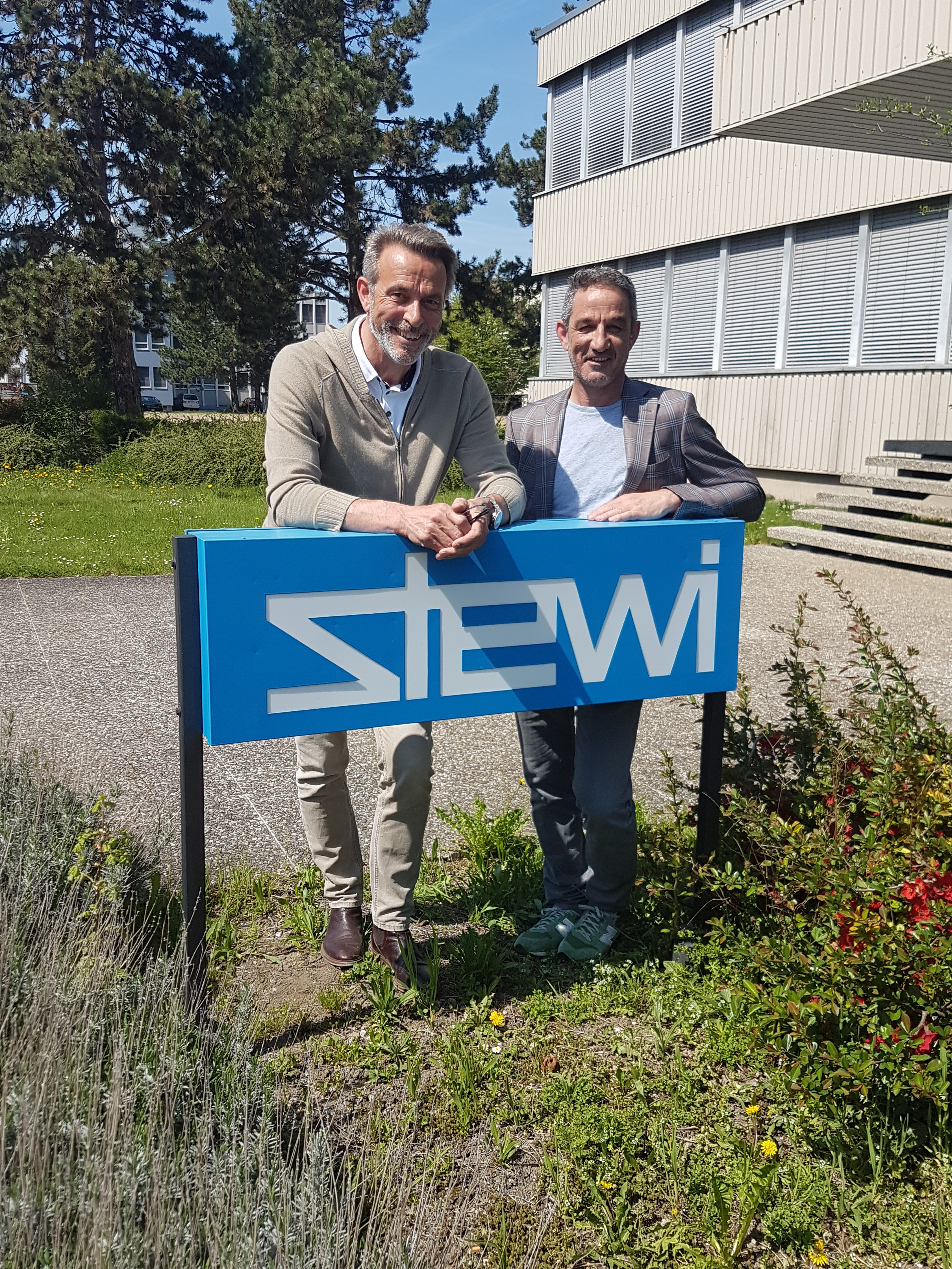 Die beiden Eigentümer von STEWI